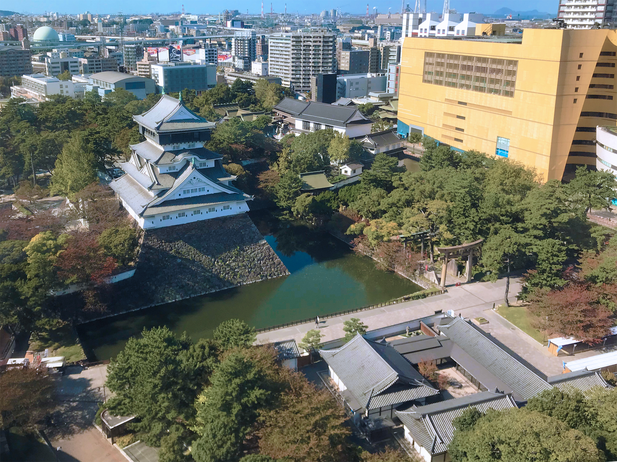 北九州市役所から望む小倉城庭園